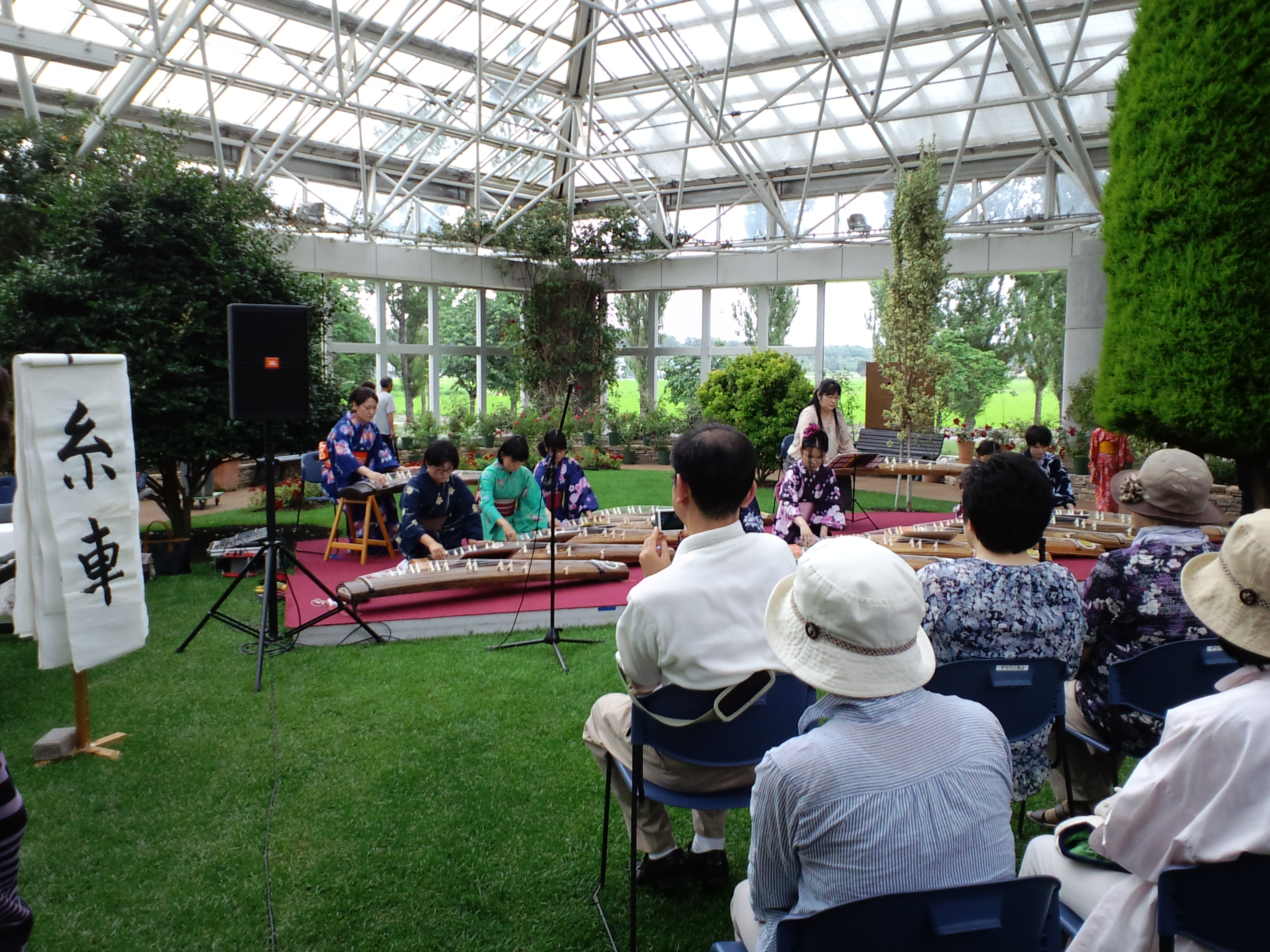 いわみざわ公園・色彩館（いわみざわ彩花まつり筝曲演奏）